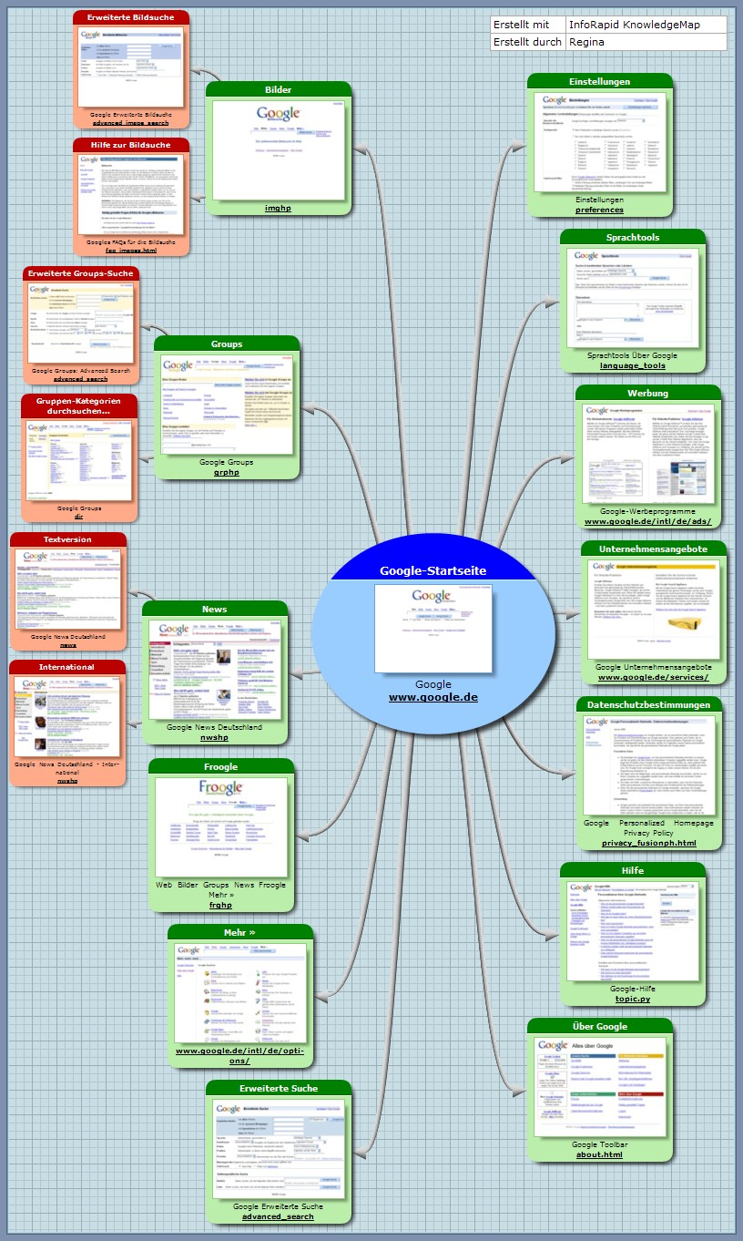 Sitemap der Webseite von Google